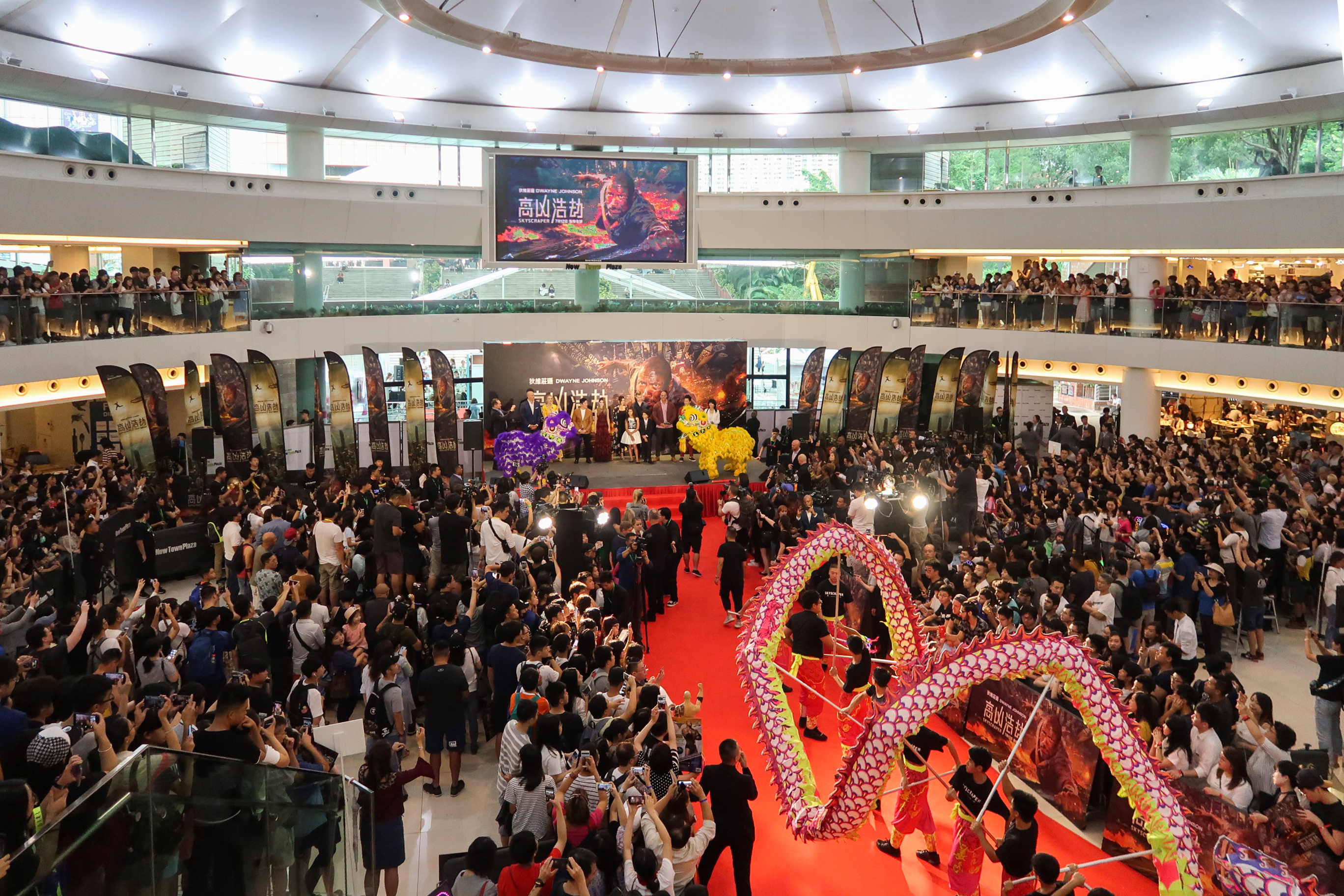 Skyscraper film premiere in Hong Kong